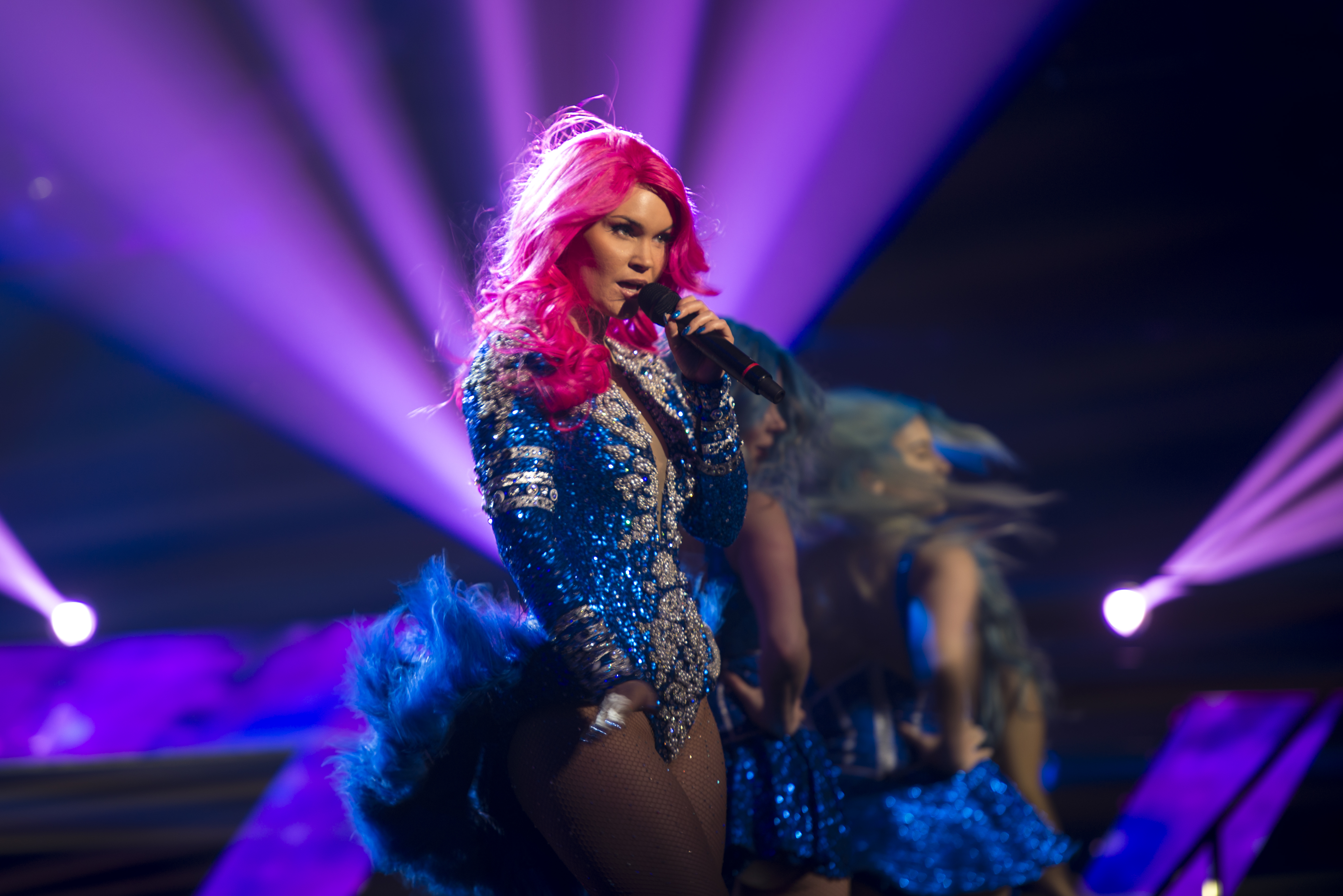 Dinah Nah på en repetition under första deltävlingen av Melodifestivalen 2017 i Göteborg.